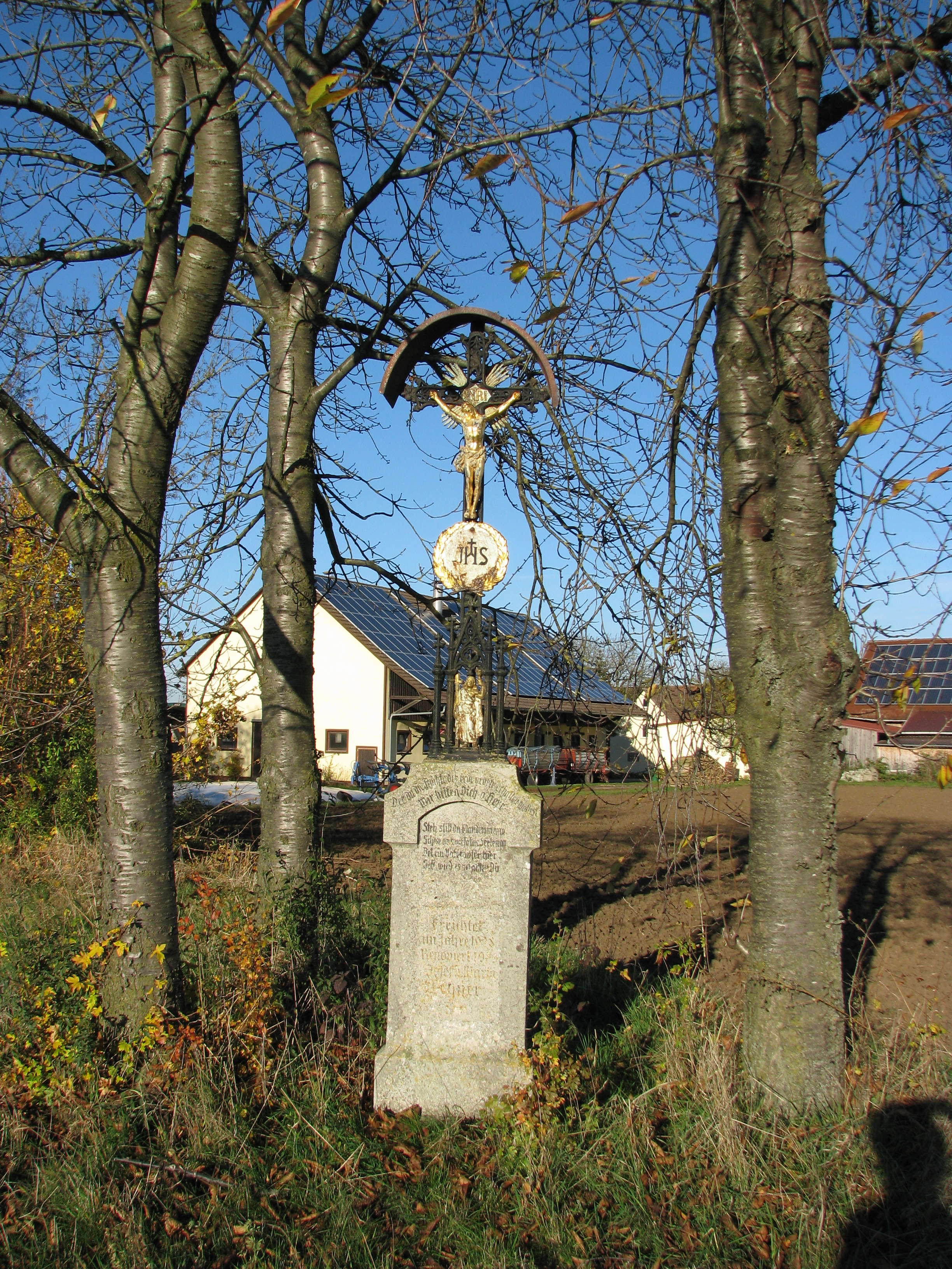 Grauwinkl, Ortsteil von Hilpoltstein im mittelfränkischen Landkreis Roth (Bayern), Wegkreuz des 19. Jahrhunderts